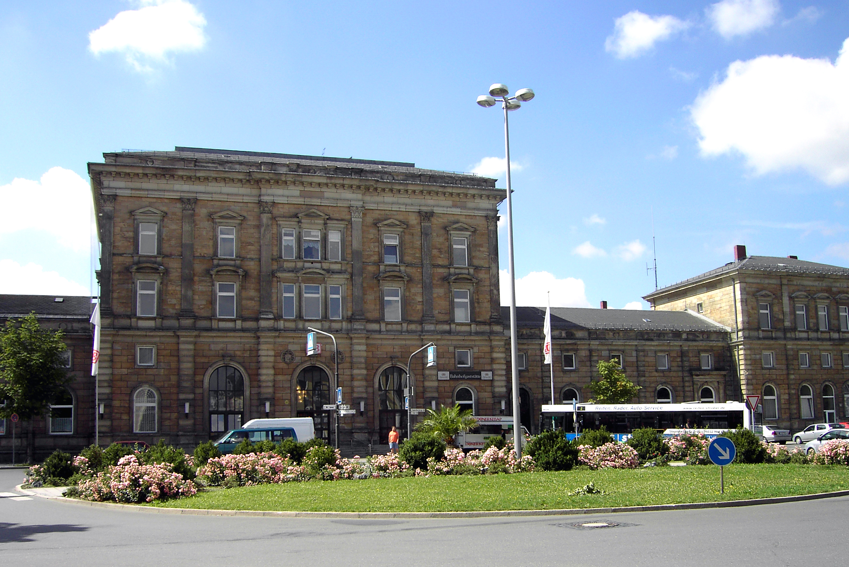 Hof (Saale) Hauptbahnhof, Empfangsgebäude